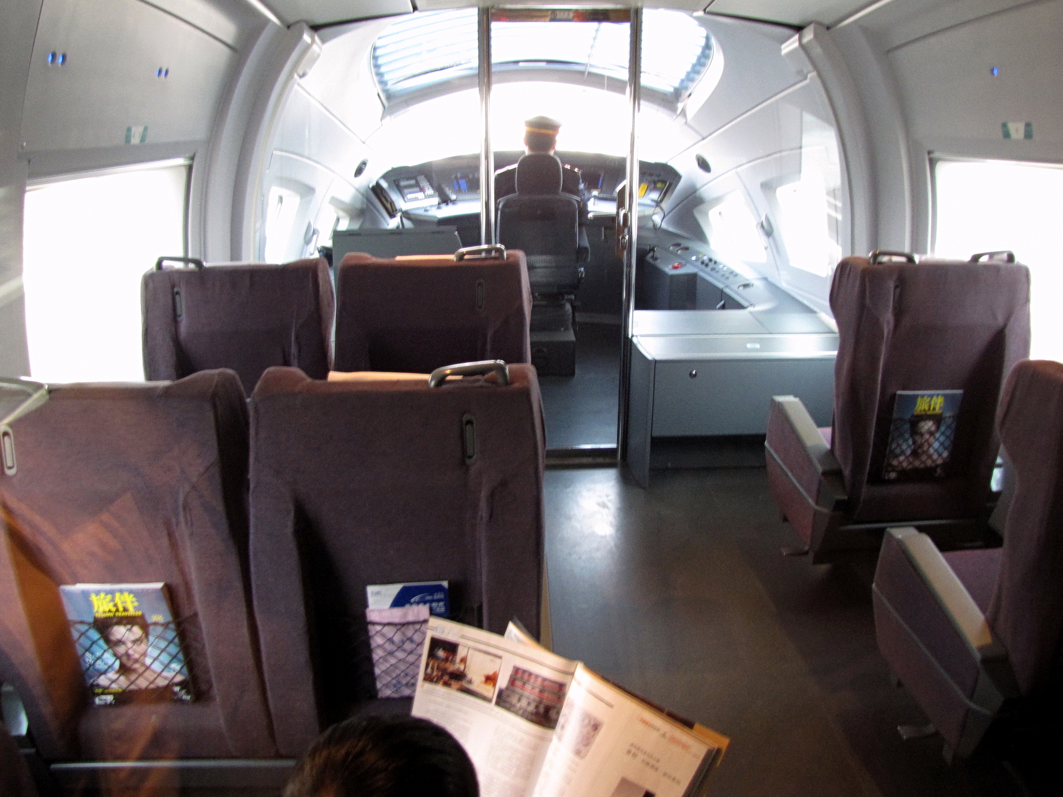 Train à grande vitesse, rame CRH3 sur la ligne Beijing-Tianjin. Compartiment panoramique.